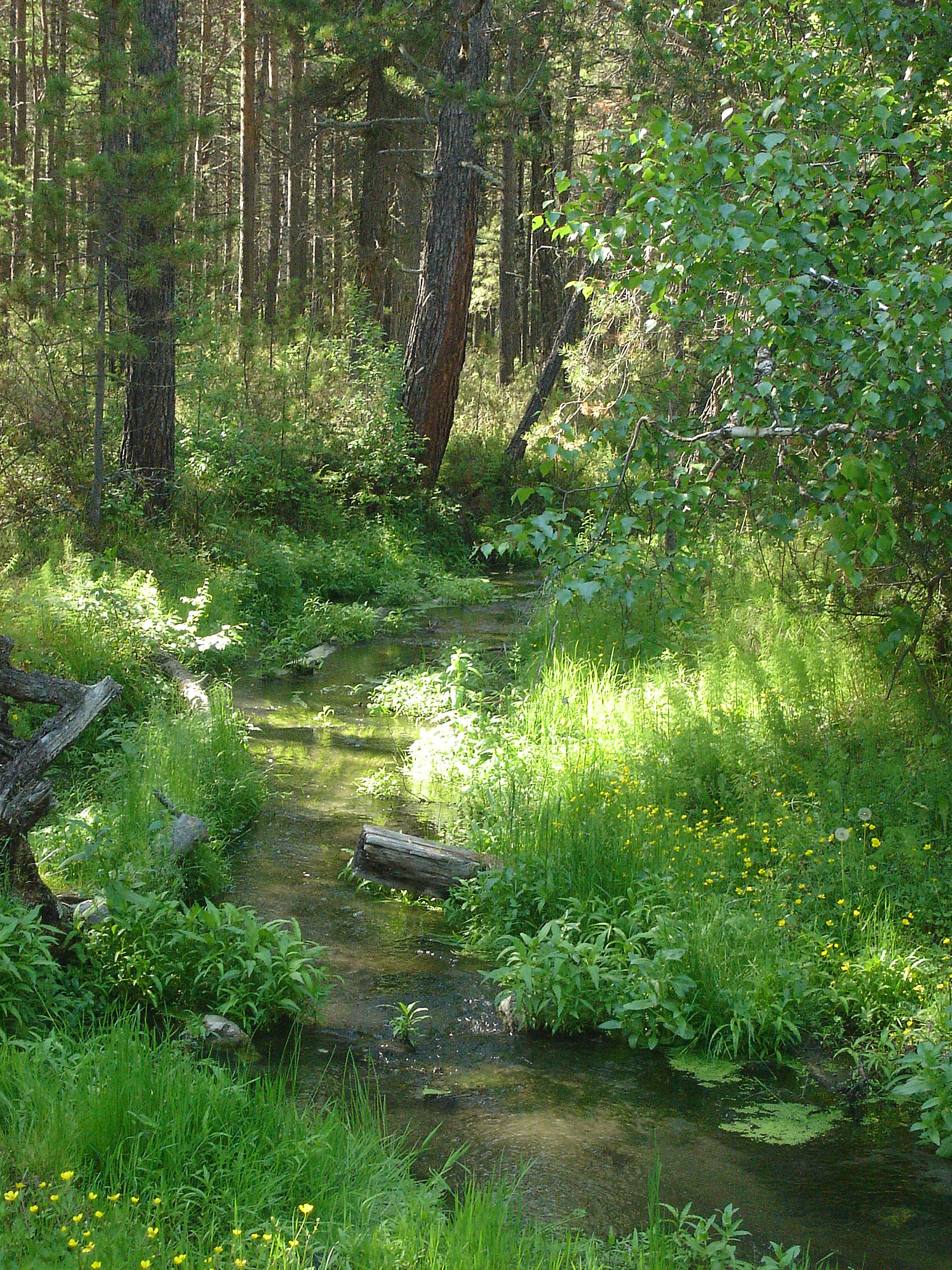 Село Горячинск, Республика Бурятия. Ручей Горячий